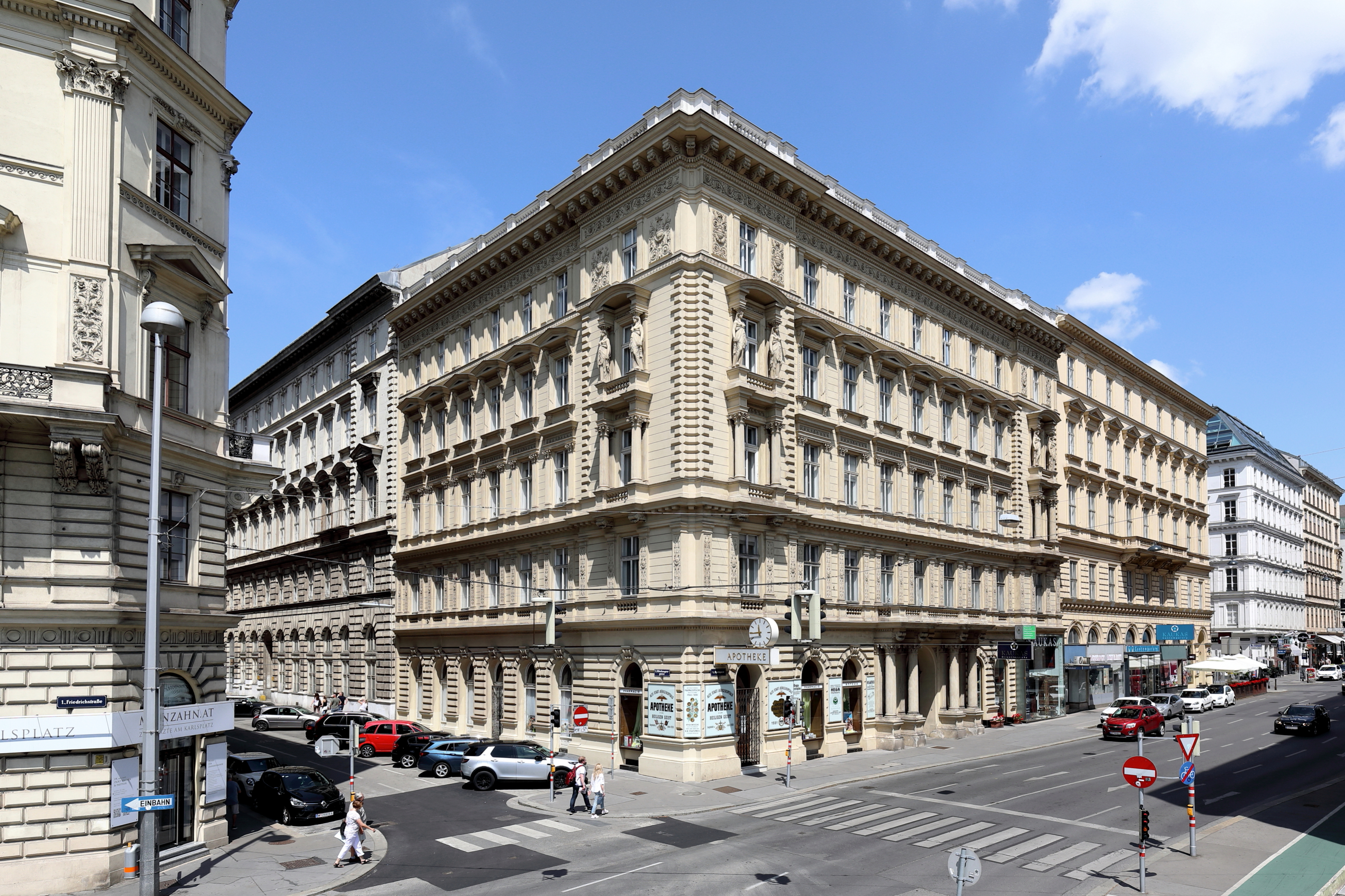 Das Wohn- und Geschäftshaus Ecke Operngasse 16 / Nibelungengasse 2 im 1. Wiener Bezirk Innere Stadt. Das Gebäude wurde 1871 nach Plänen des Architekten Ferdinand Schlaf errichtet.